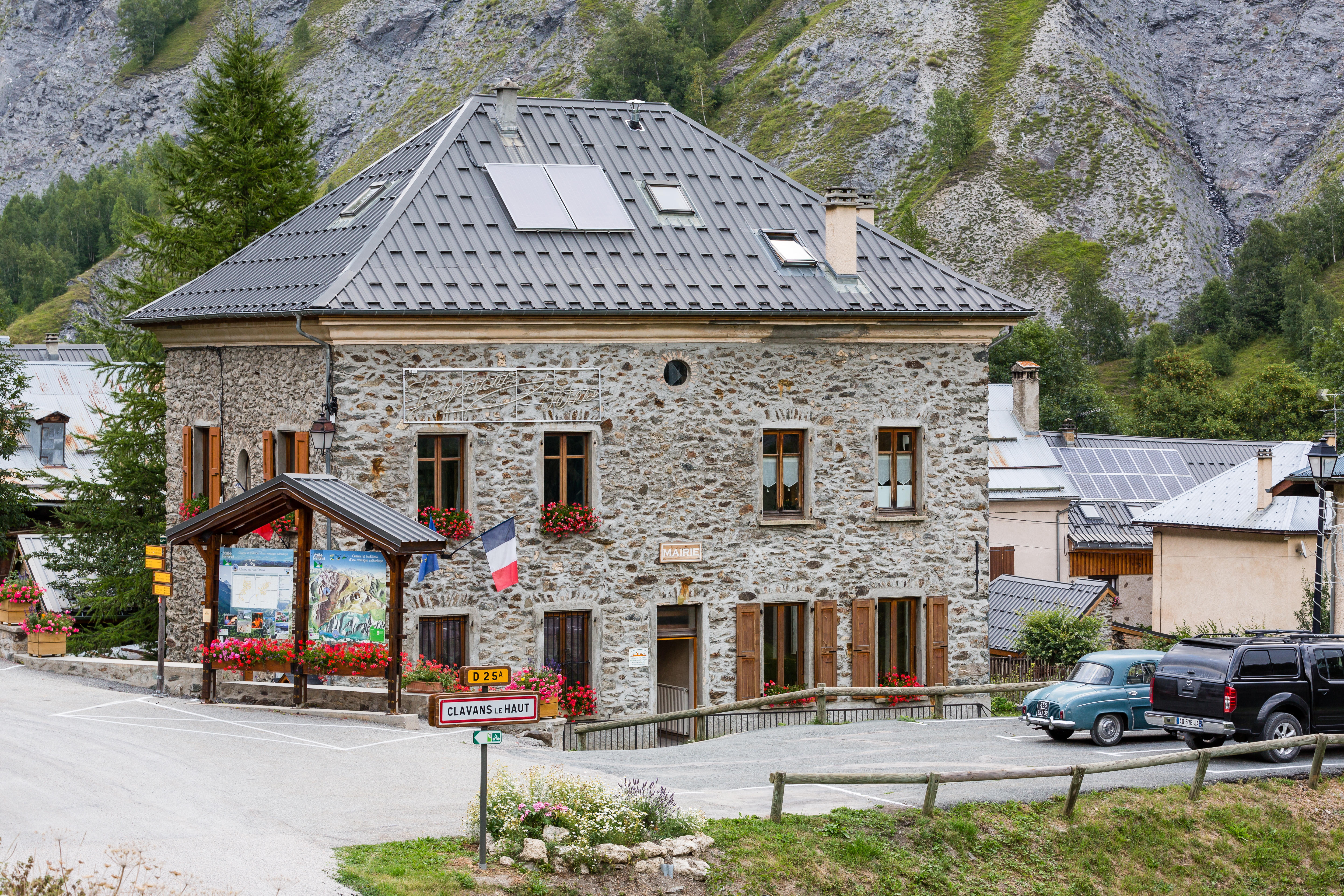 Mairie de Clavans-en-Haut-Oisans (France).